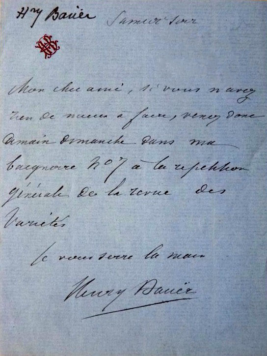 Рукописное письмо Генри Бауэра. Приглашение на посещение репетиции спектакля.